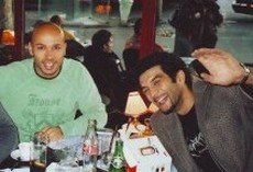 Éric Judor et Ramzy Bedia, humoristes et comédiens français.